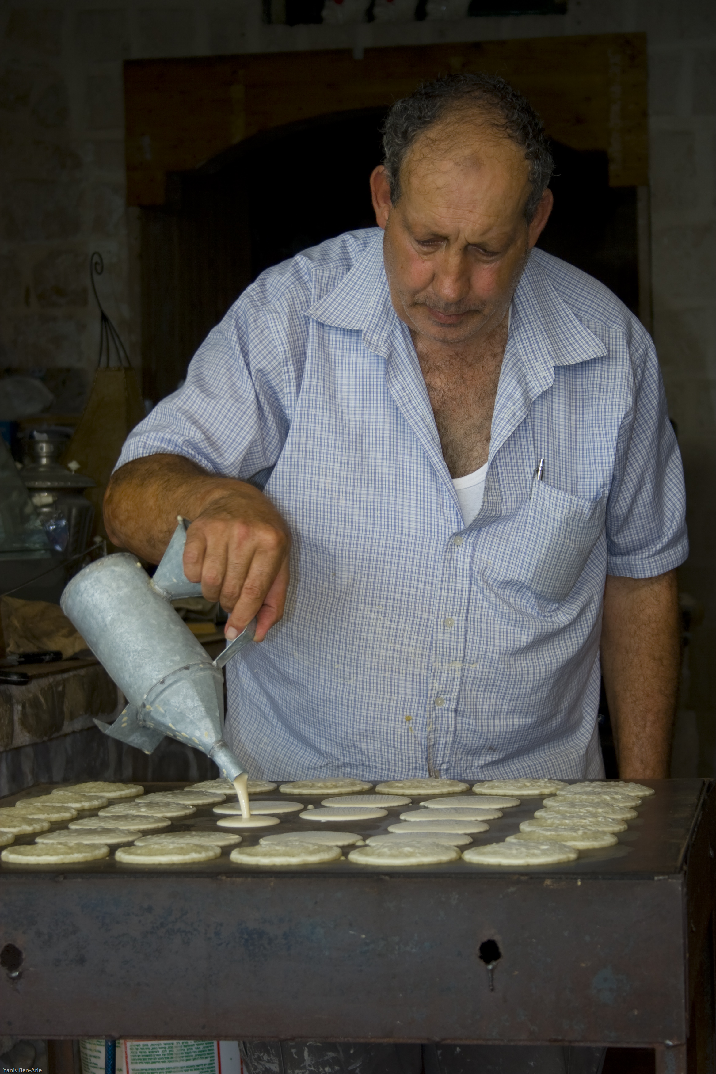 Preparing Qataif at Nazerat, Israel